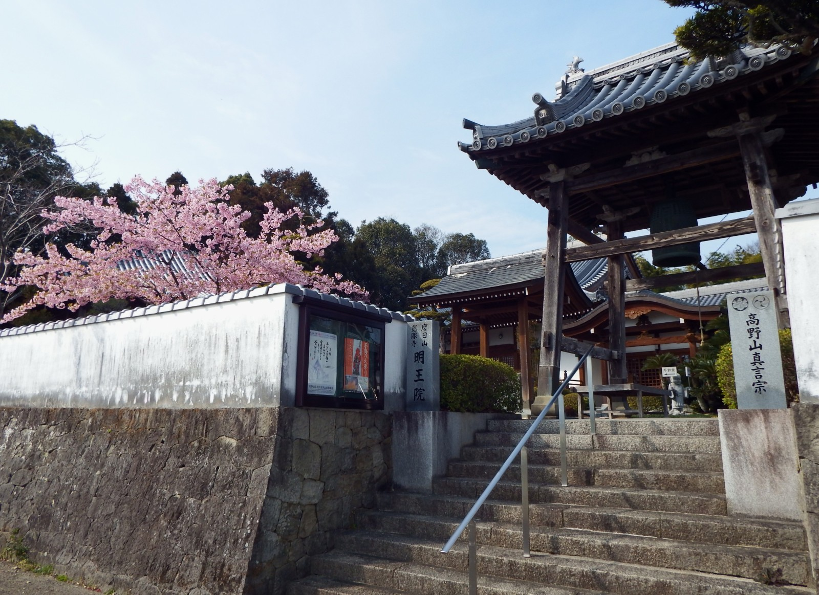 明王院の鐘楼門